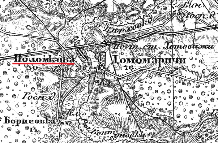 Деревня Полошково (с опечаткой в названии) Климовичского уезда Могилёвской губернии на военно-топографической карте Российской Империи. 1913 год.